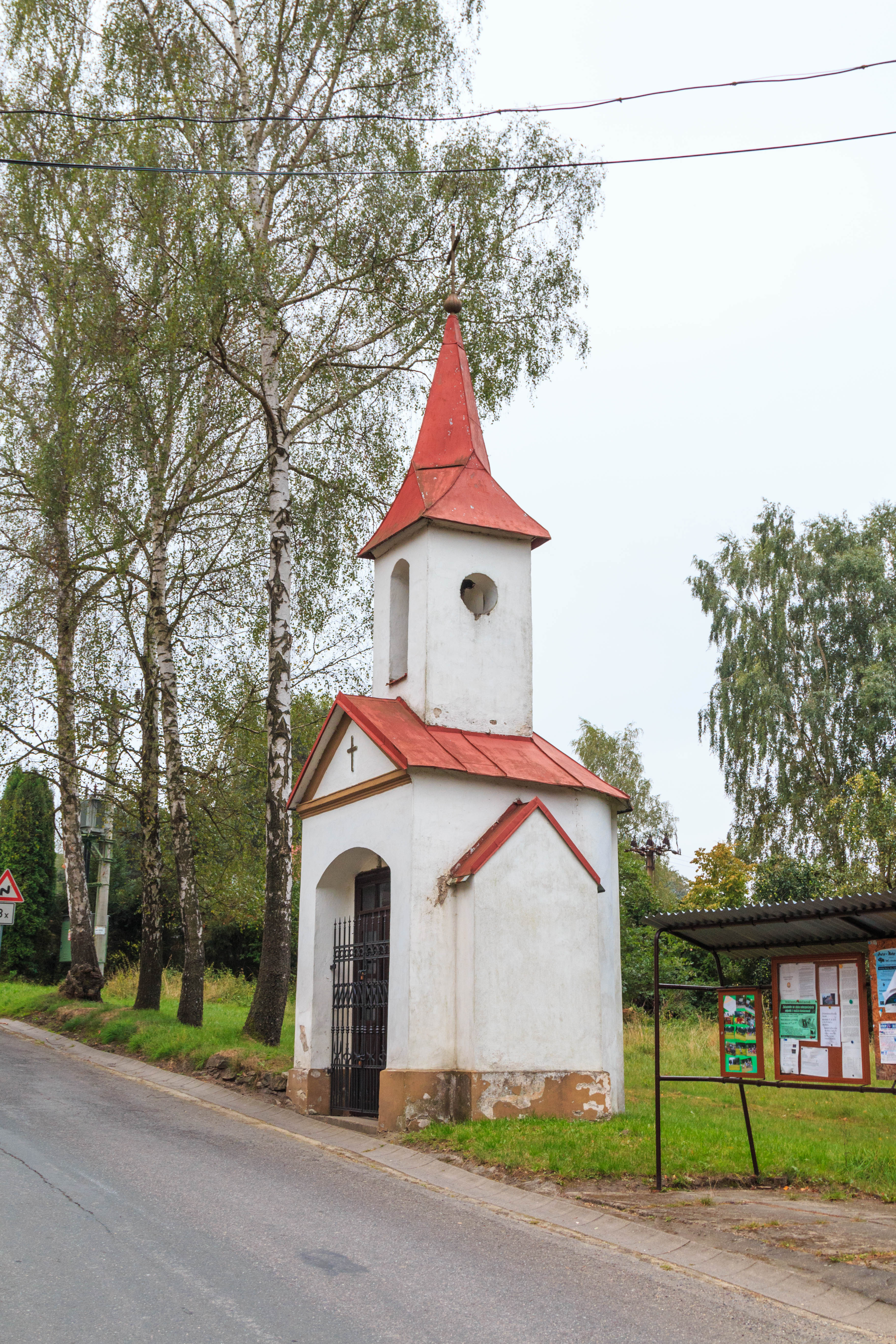 Klokočovská Lhotka kaple